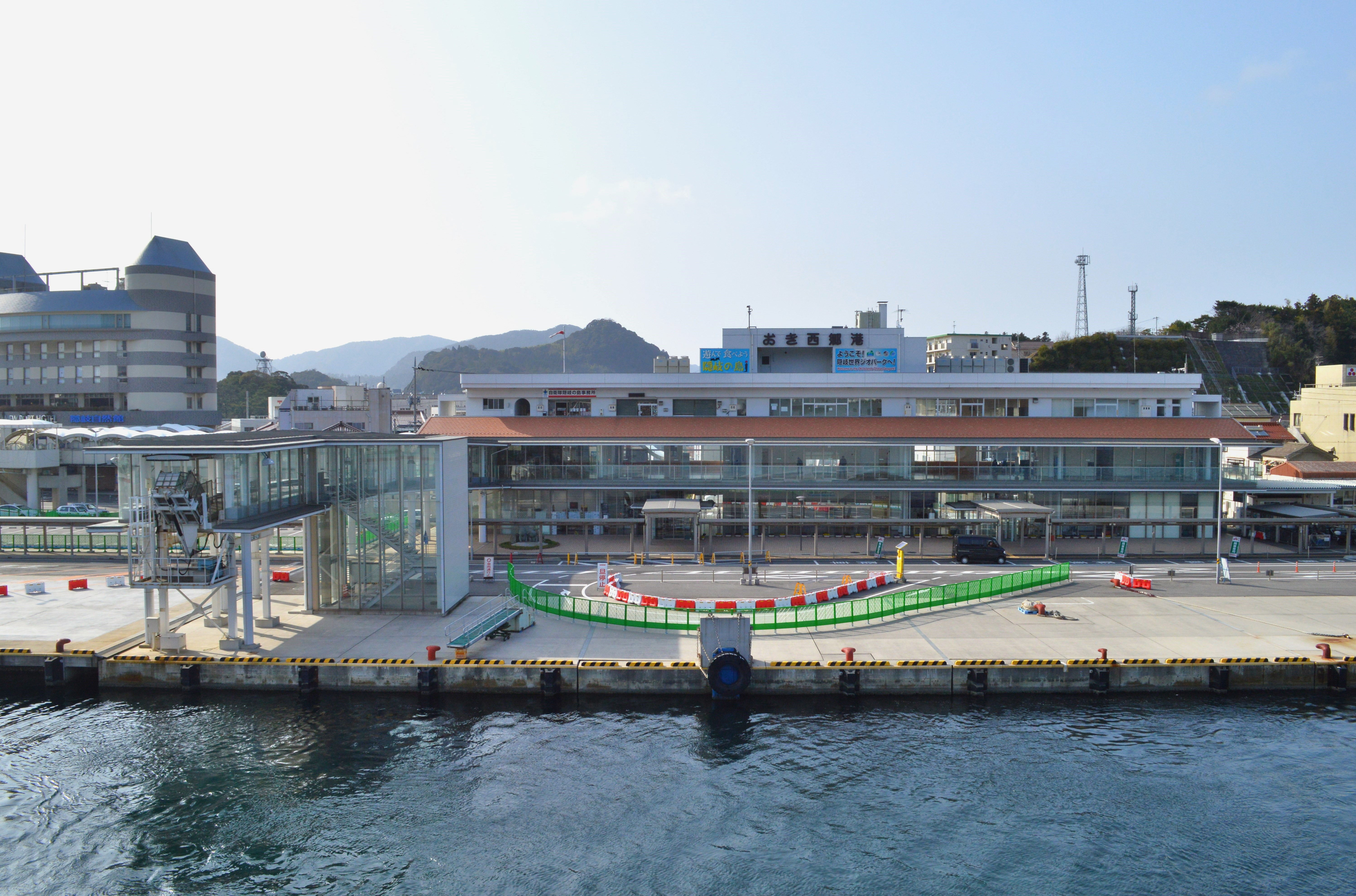 西郷港ターミナルビル